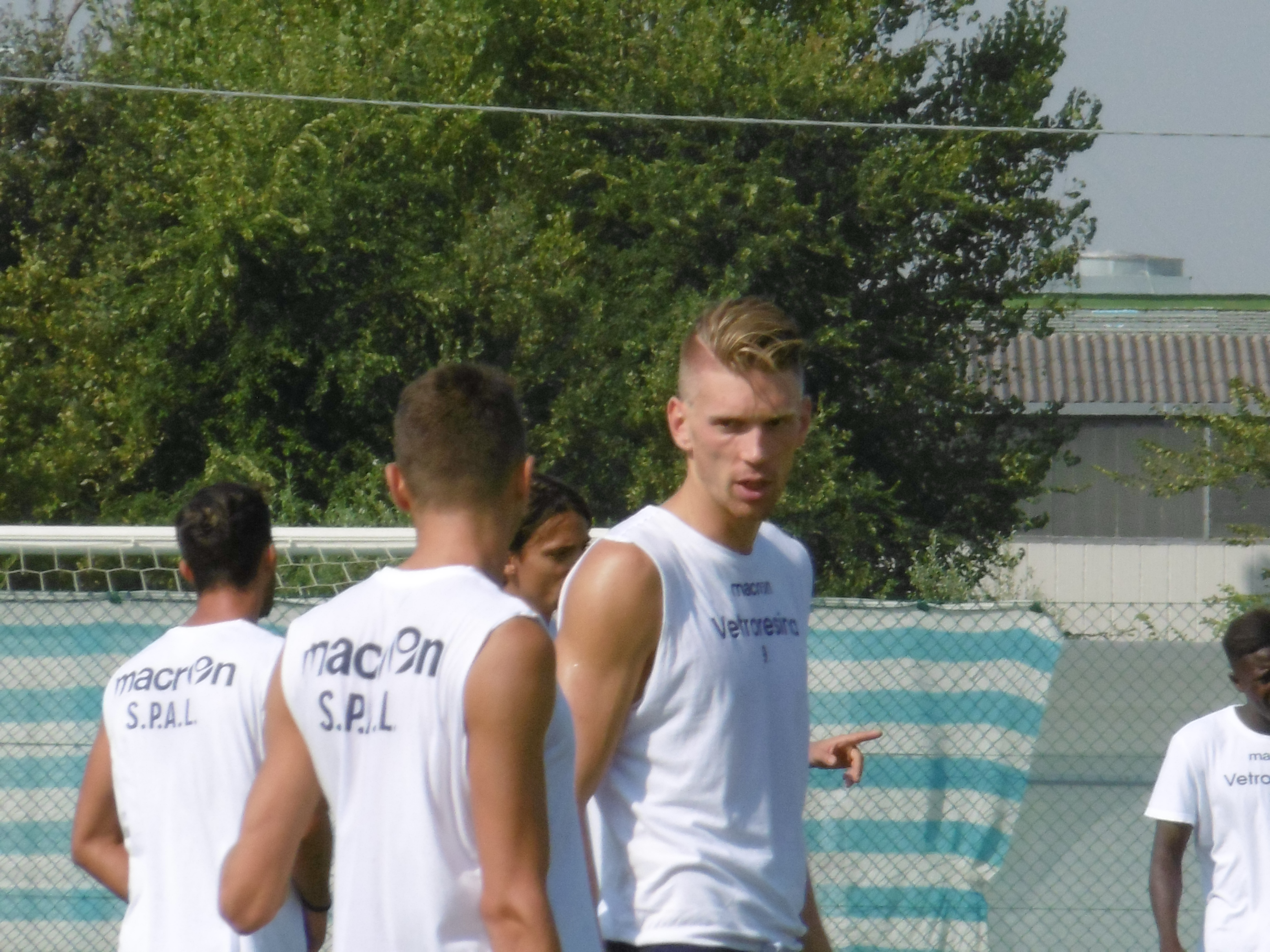 Bartosz Salamon, giocatore della Spal